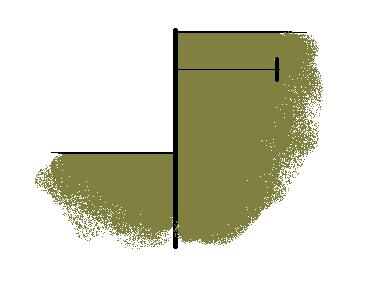 Zelf gemaakt